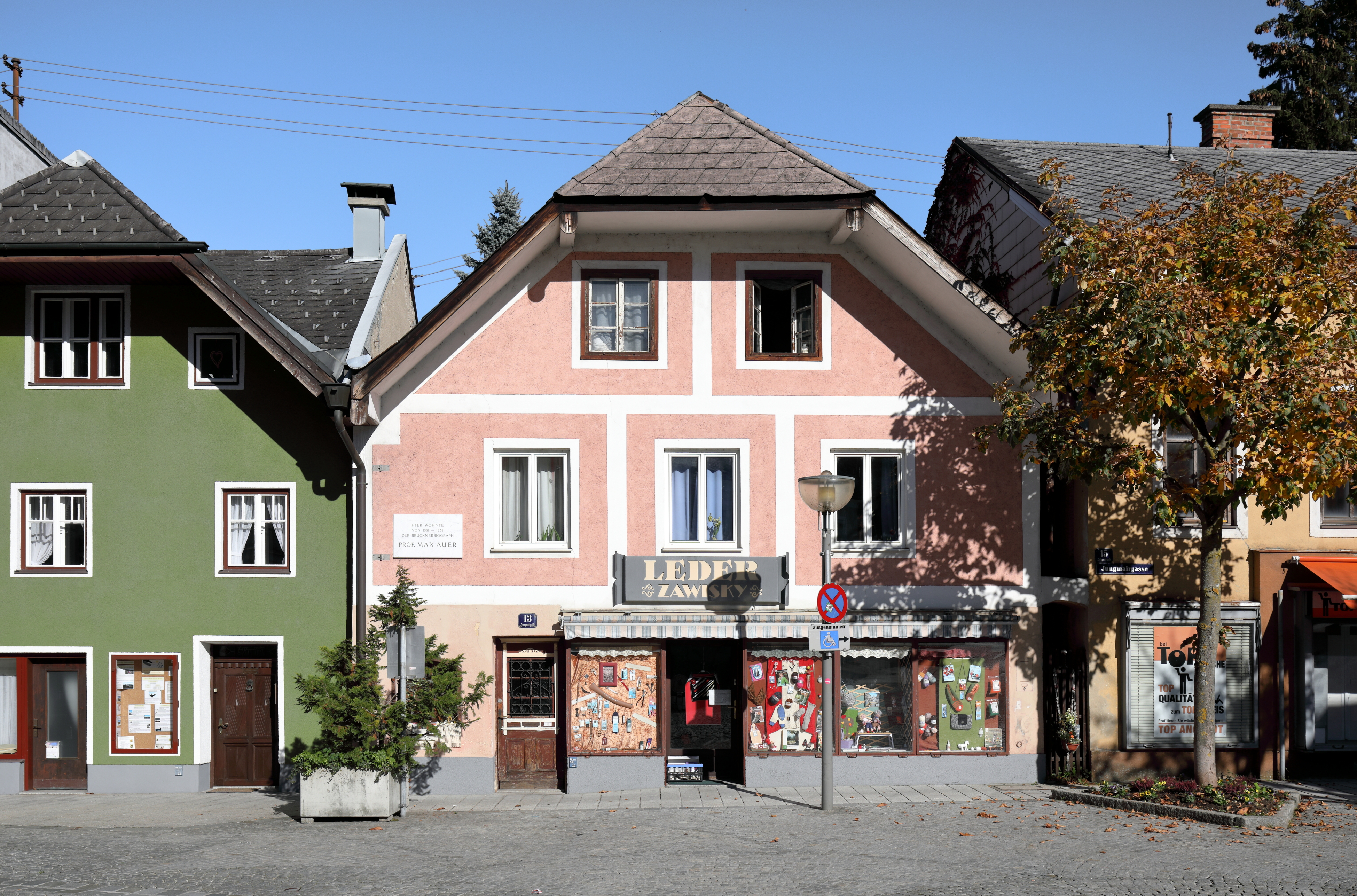 Das Wohn- und Geschäftshaus an der Adresse Rudolf-Jungmair-Gasse 13 in der oberösterreichischen Bezirkshauptstadt Vöcklabruck. In diesem Haus wohnte von 1881 bis 1938 der Brucknerbiograf Max Auer.